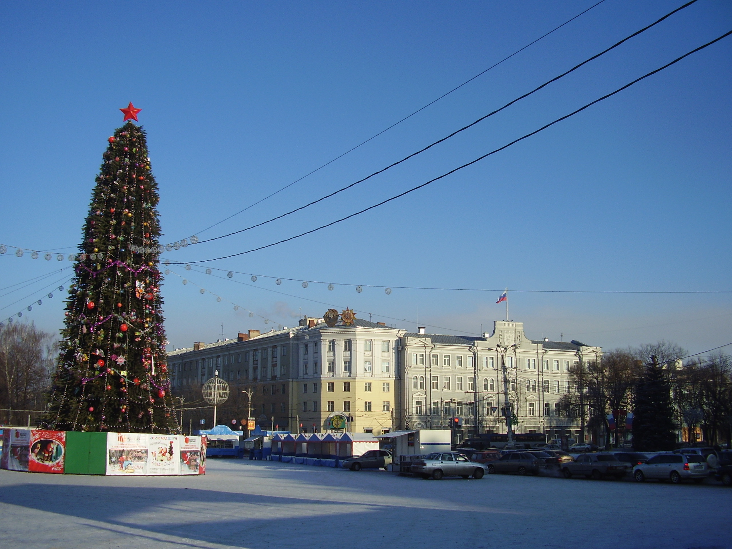 Воронеж,ёлка на площади Ленина